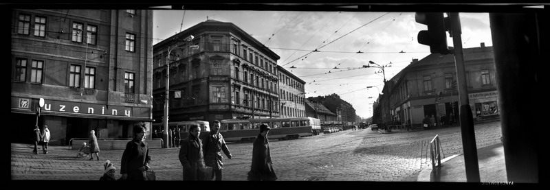 Photograph from Jiří Poláček´s archive.